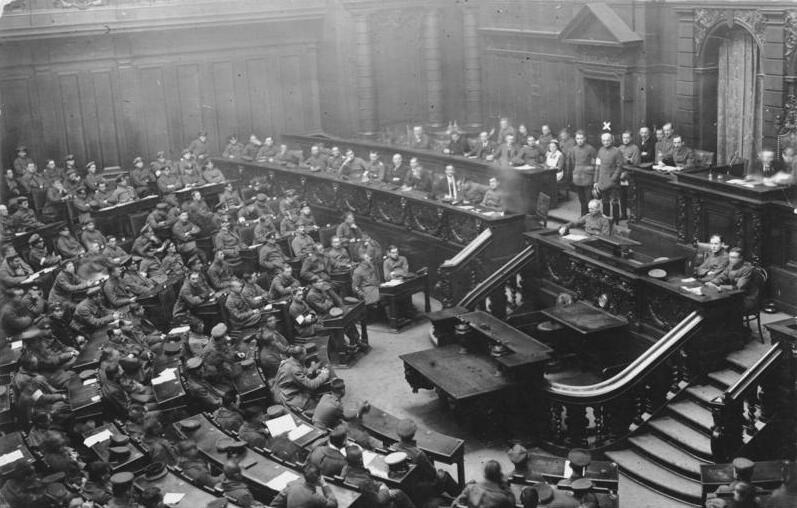 Von der Republikanischen Schutztruppe 273. Sitzung der Republikanischen Schutztruppe im Reichstag. (x) Oberst Grautoff, der Leiter der Truppe, ca. Ende 1918